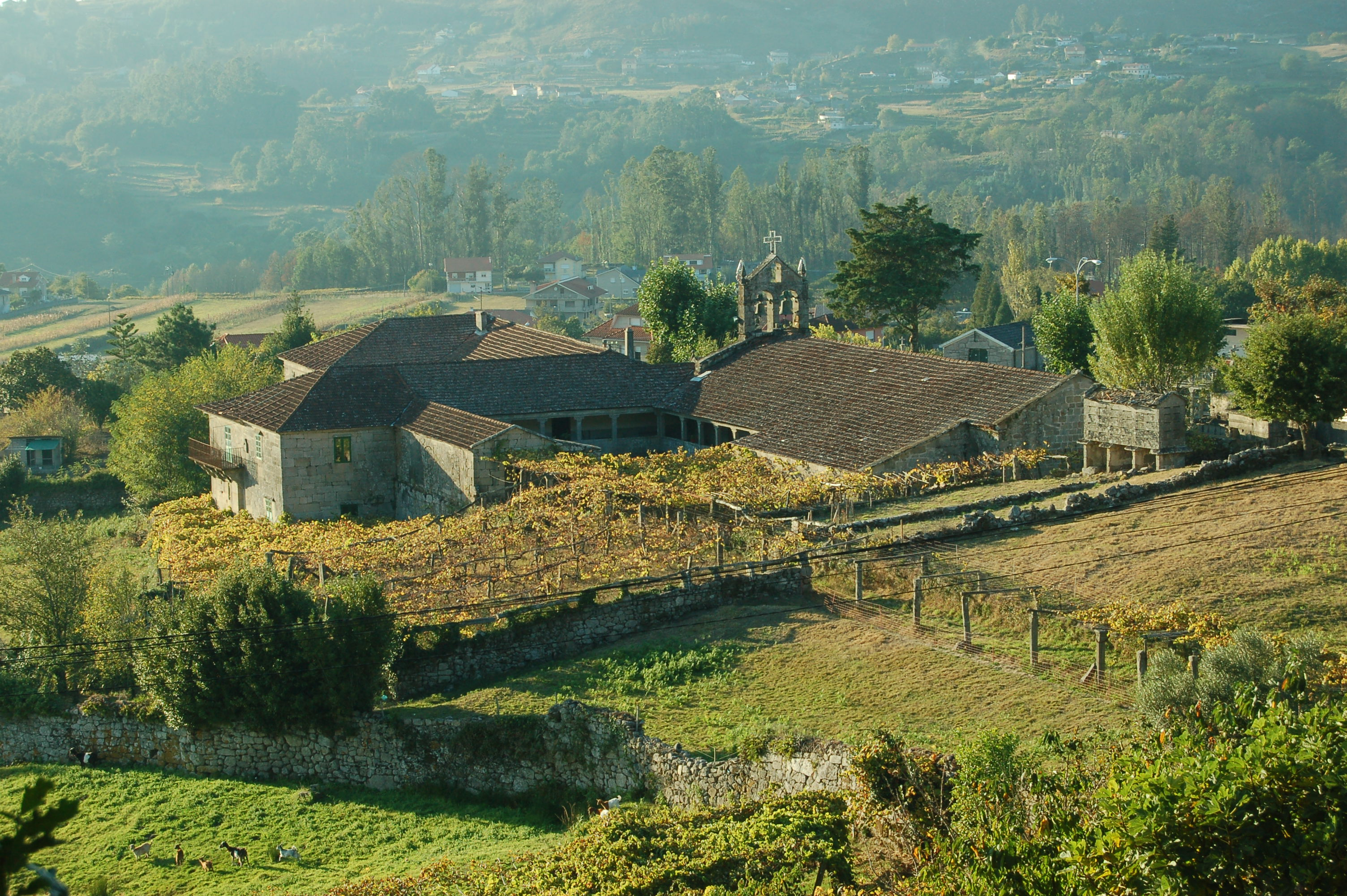 Mosteiro e Igrexa de San Pedro de Tenorio